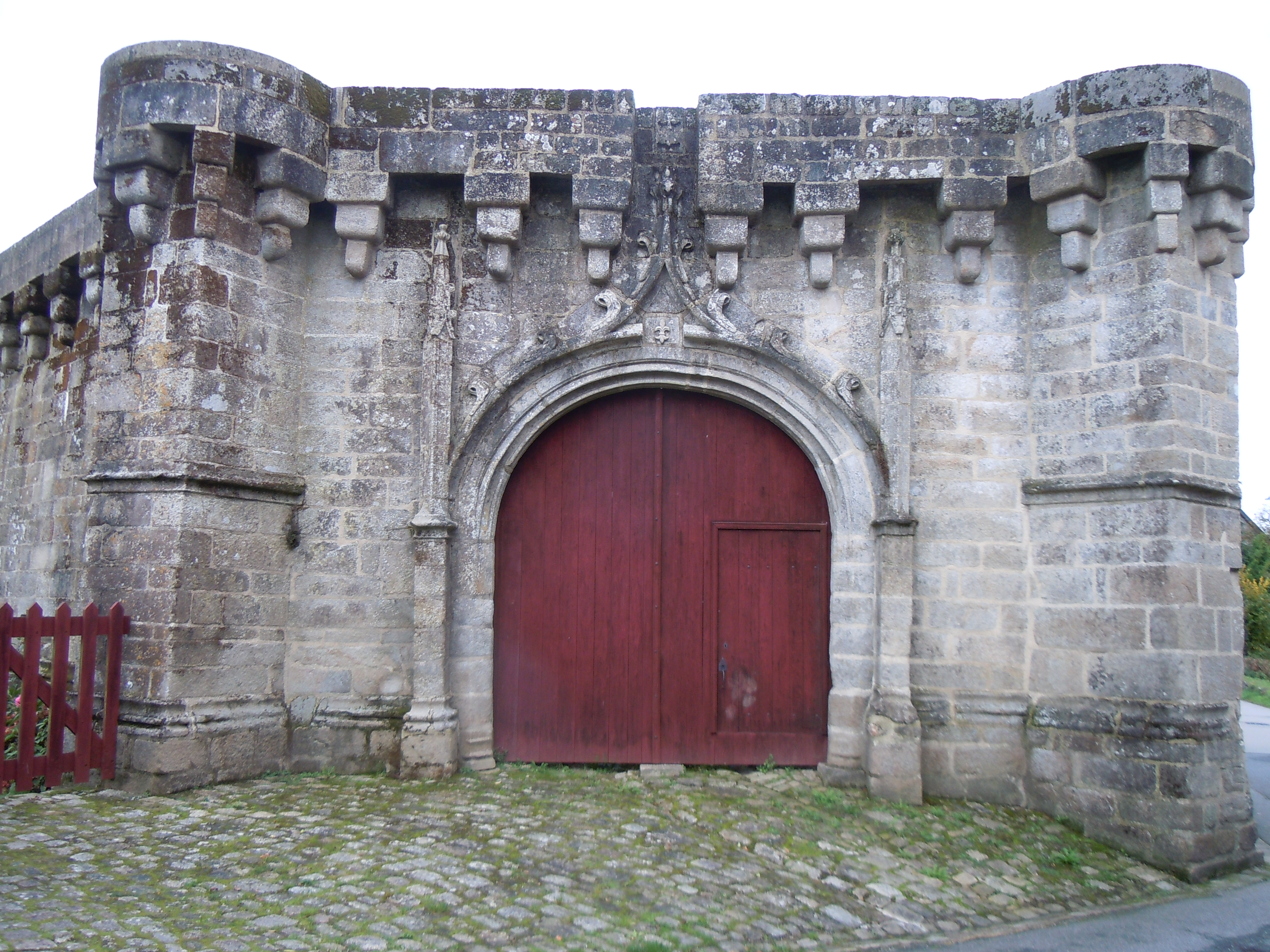 Porte des Rohan, vestige du château des Princes de Guémené à Guémené-sur-Scorff, département du Morbihan